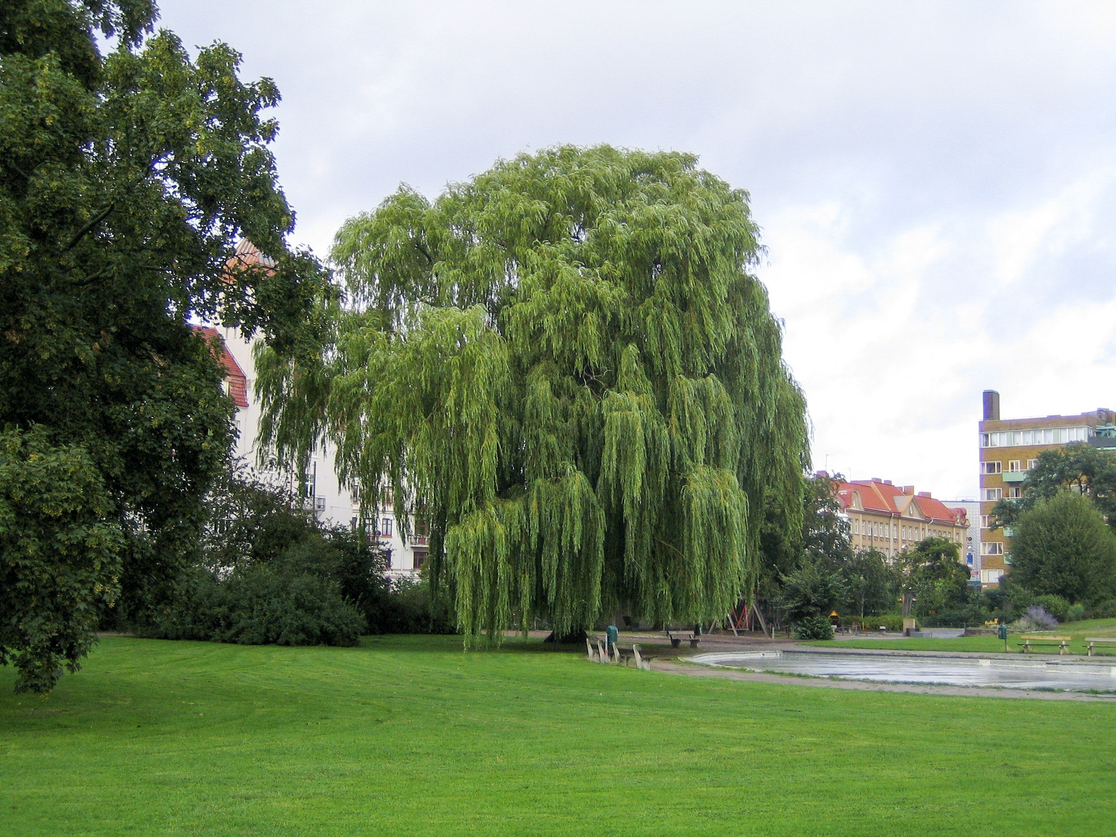 Rörsjöparken in Malmö, Sweden.